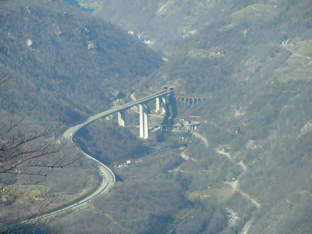 Gola della Biaschina